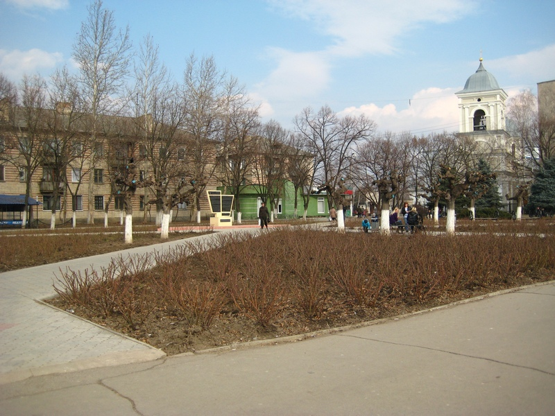 Сквер - бывшая торговая площадь